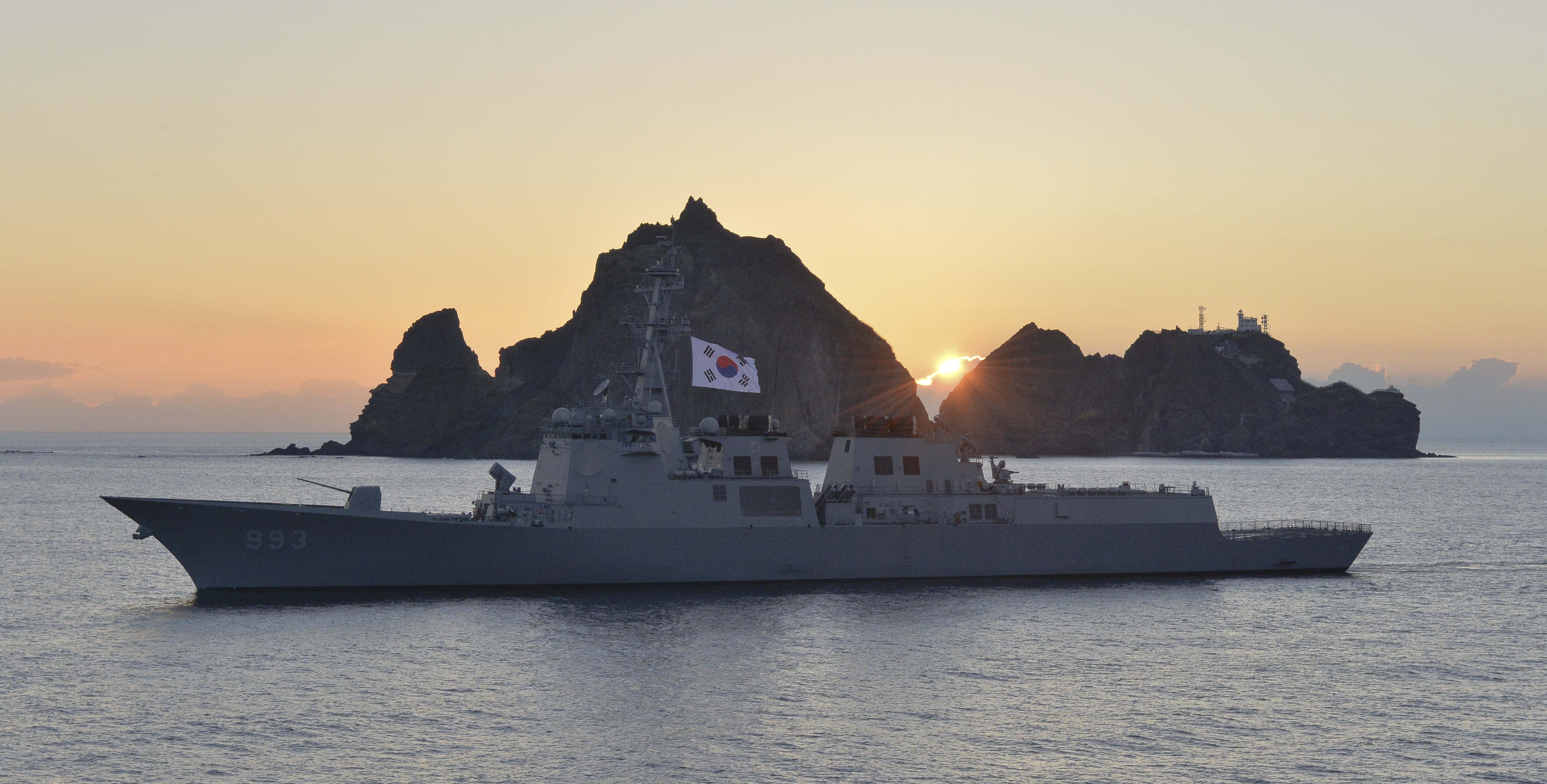 광복절일출_NPC_4462